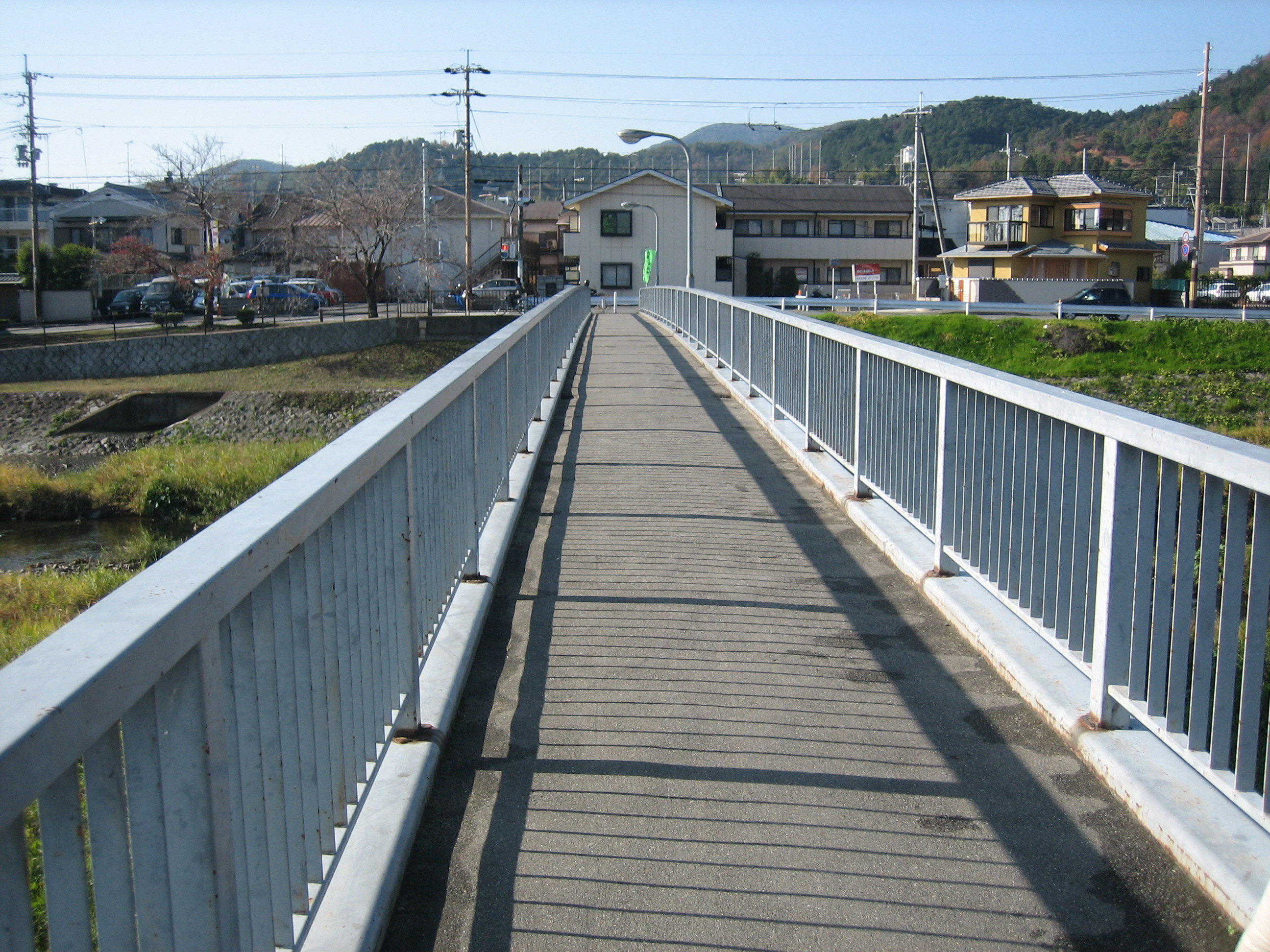 賀茂川通学橋を橋上から撮影